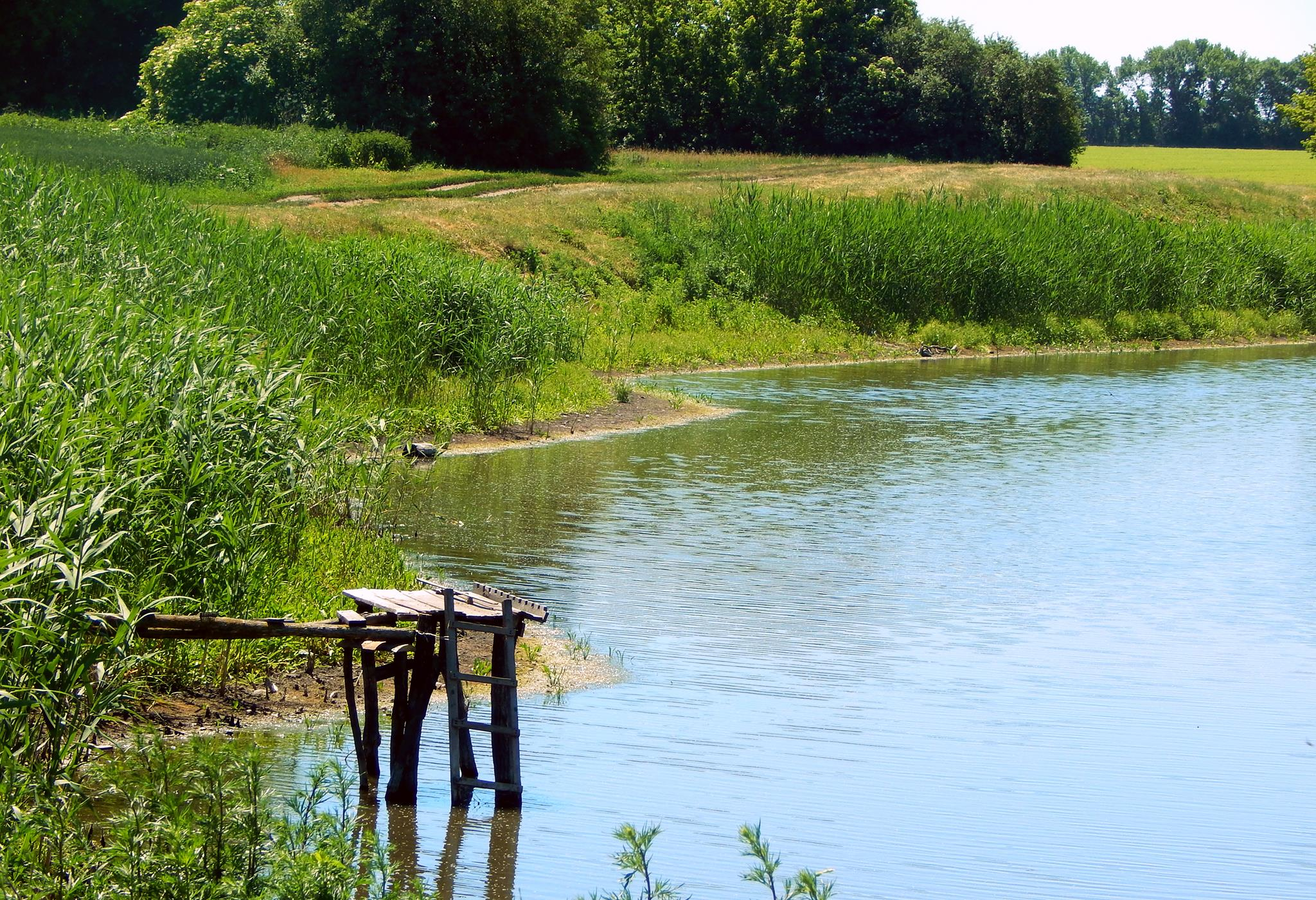 Ставок в селі Козубівці